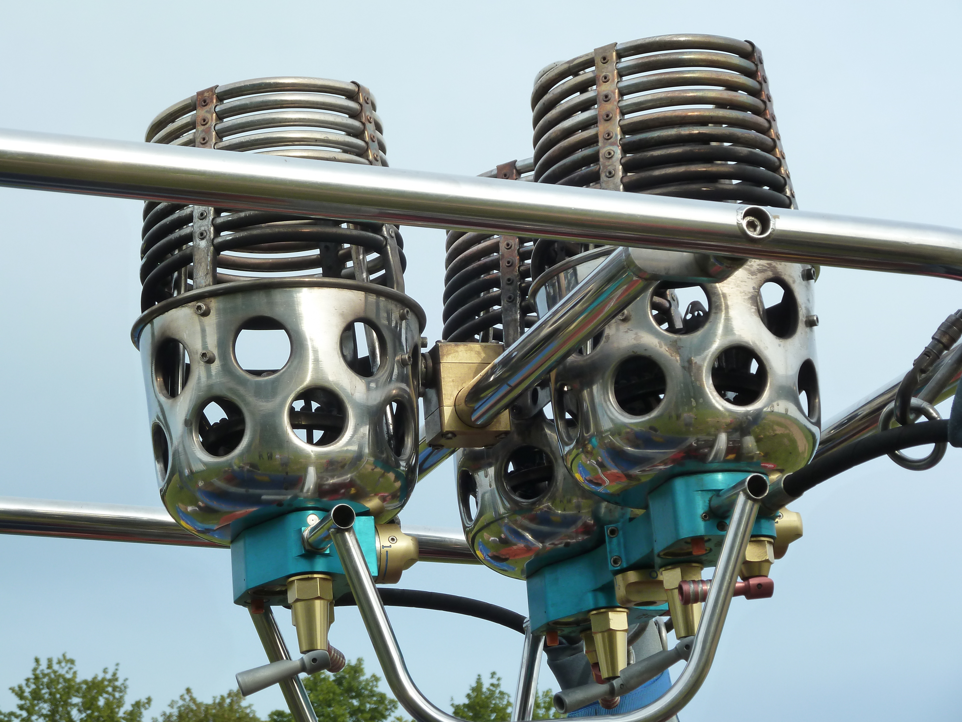 eine Detailaufnahme von einem Brenner eines Heißluftballon